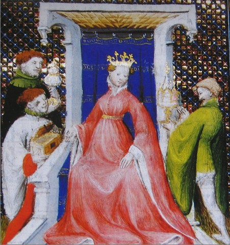 Jana I. Neapolská